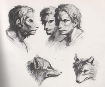 Gravures du traité de physionomonie de Ch. Lebrun et Morel d'Arleux, 1806